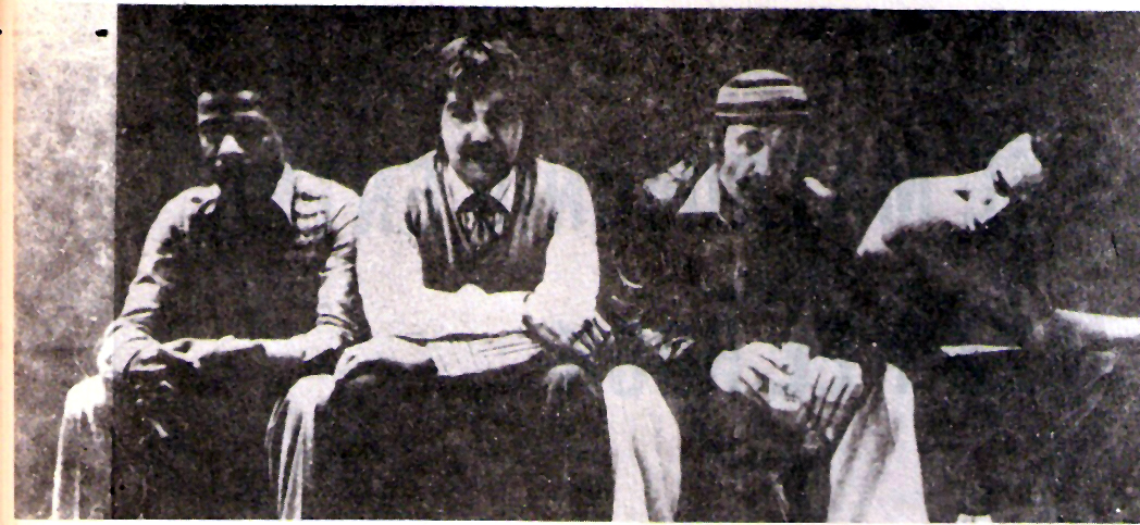 Weather Report fue un grupo de jazz-rock que estuvo activo entre 1970 y 1985; interesado en general por la fusión y liderado por Joe Zawinul, anticipó y contribuyó a la apertura musical estadounidense a las músicas del mundo.